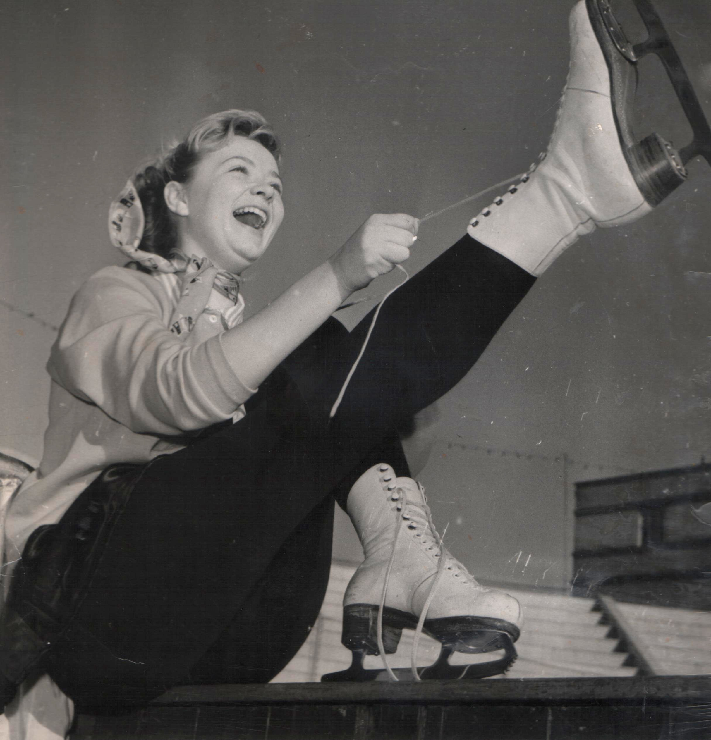 Milena Dravić,krajem 50-tih 20. veka.Foto: Stevan Kragujević (po odobrenju kćerke Tanje Kragujević)